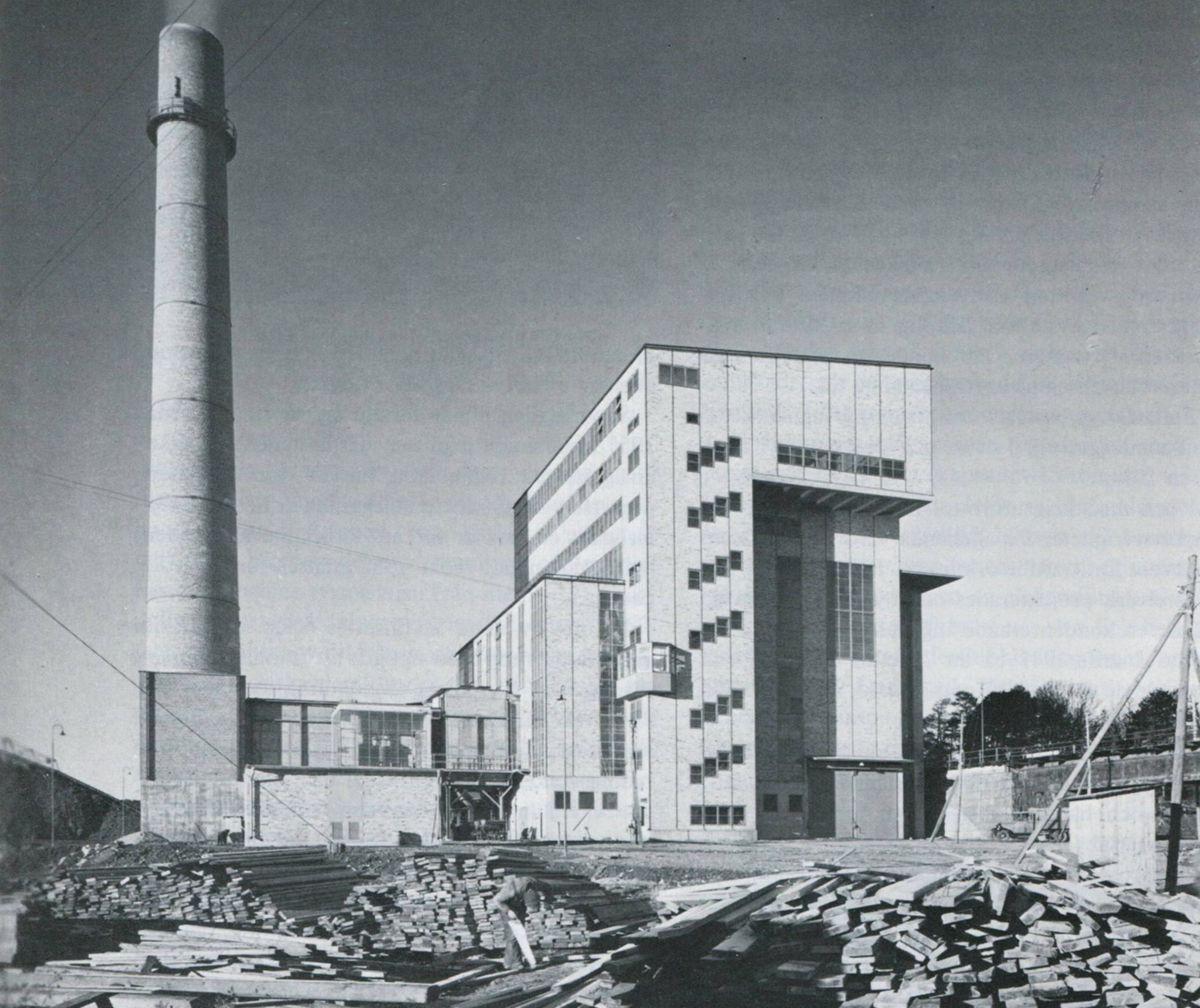 Lövsta andra sopförbränningsanläggning, arkitekt Holger Blom